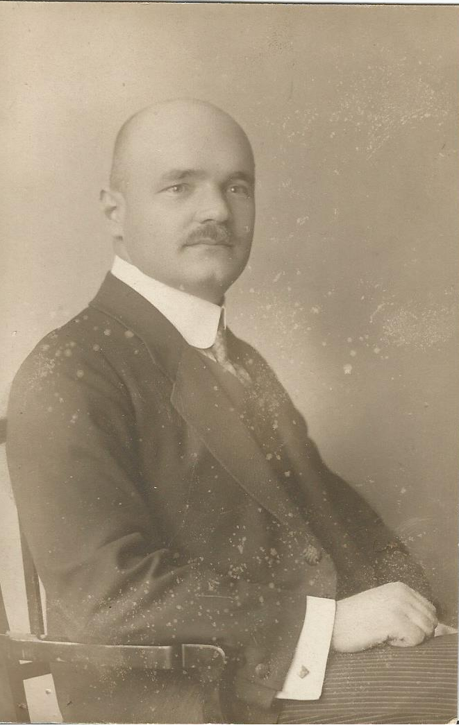 dr. Lux Gyula (1884-1957) tanár, nyelvész, a dobsinai és dél-szepesi német kultúra kutatója Kolozsvár